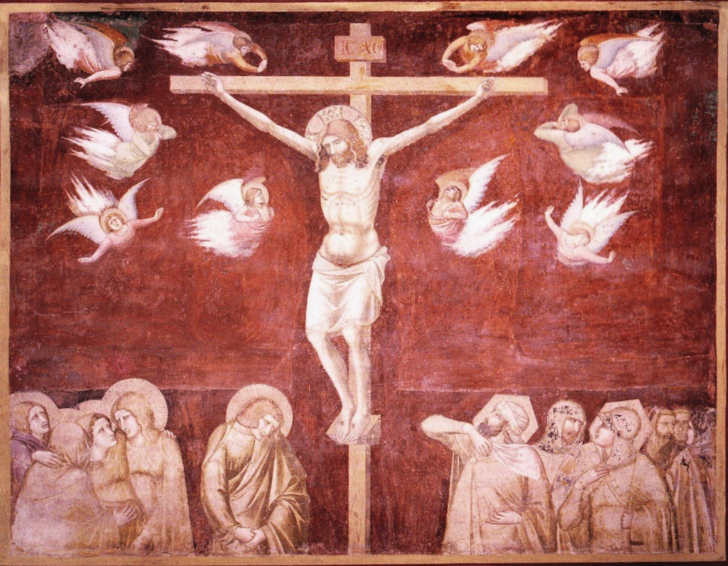 Pietro lorenzetti, crocifissione di san francesco a siena